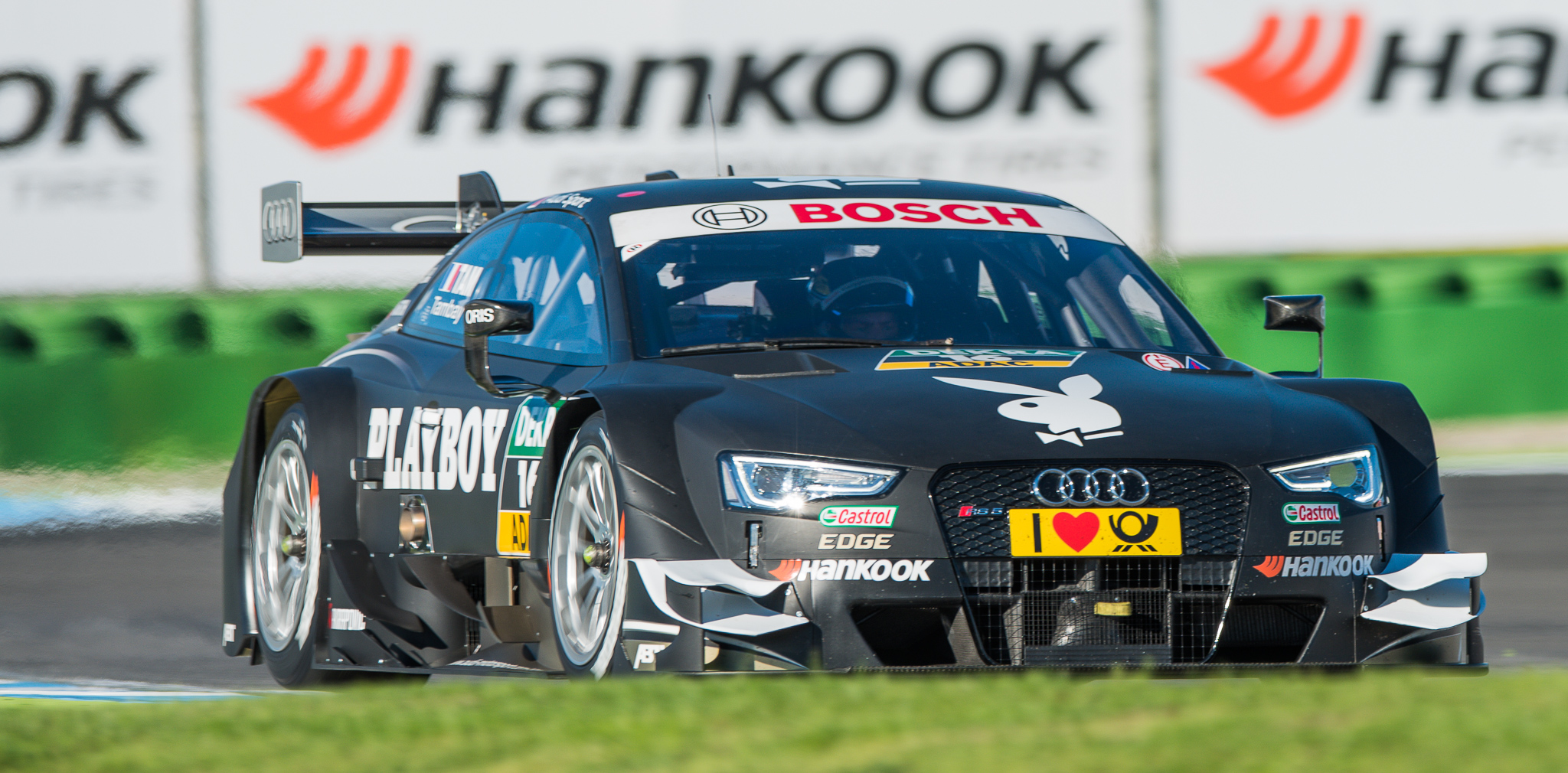 Abt Sportsline GmbH,Adrien Tambay,DTM,Deutsche Tourenwagen Masters,Hockenheimring,Motorsport,Playboy Audi RS 5 DTM